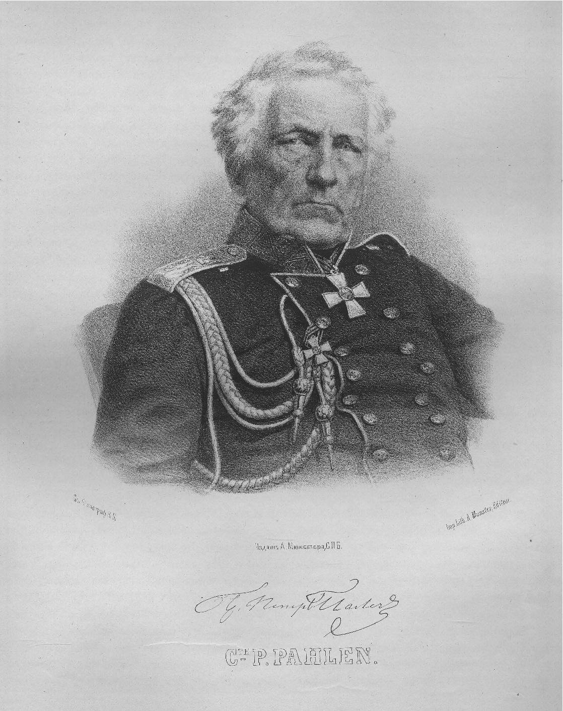 Пален, Пётр Петрович